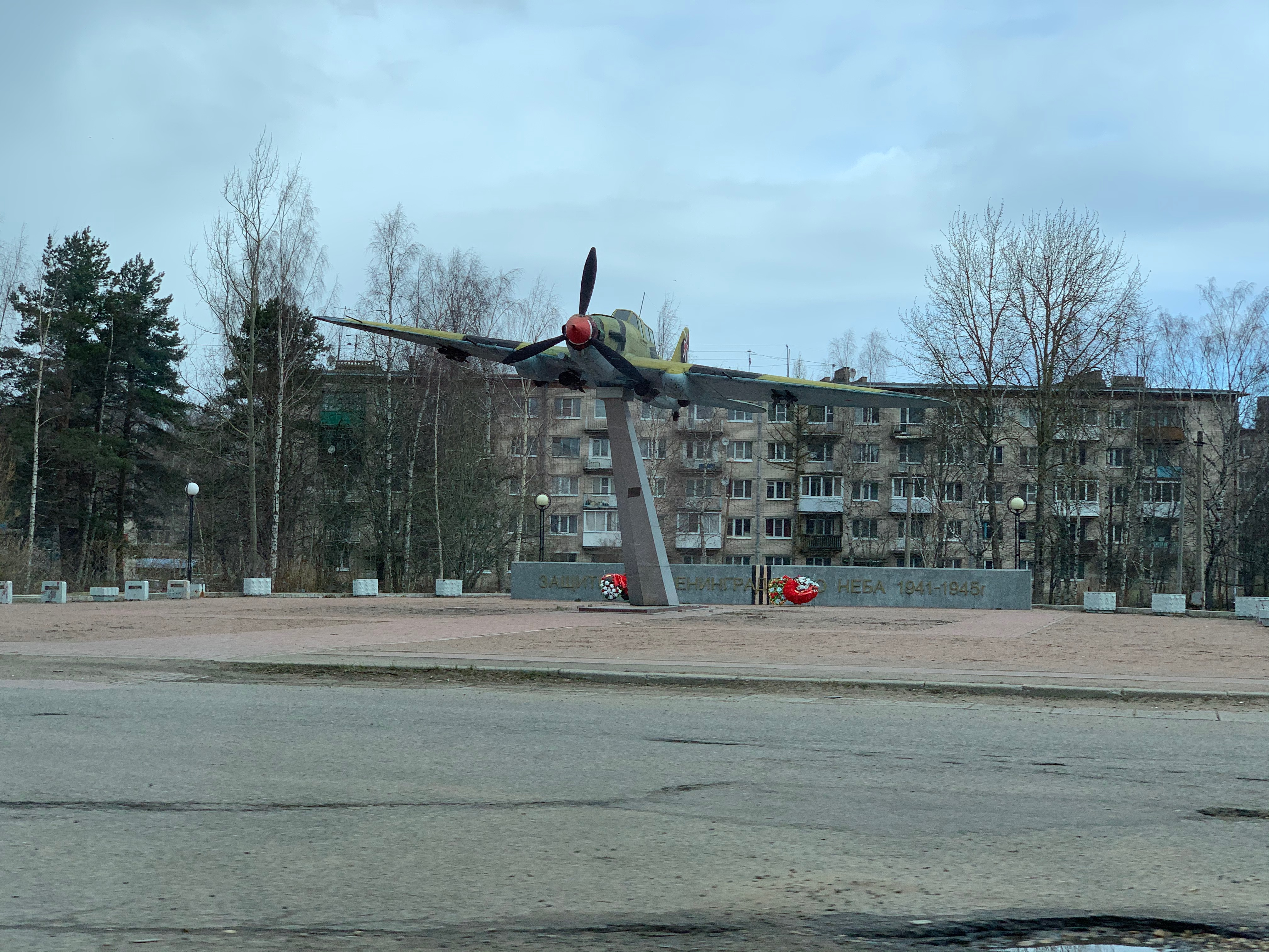 Лебяжье